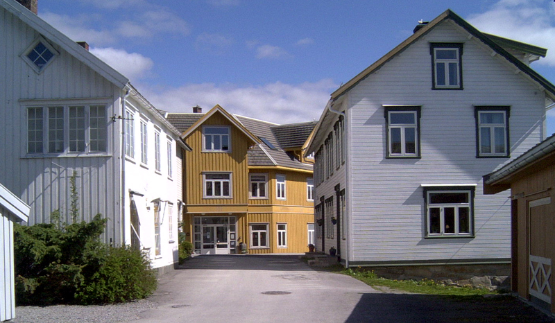 Straumen, Inderøy